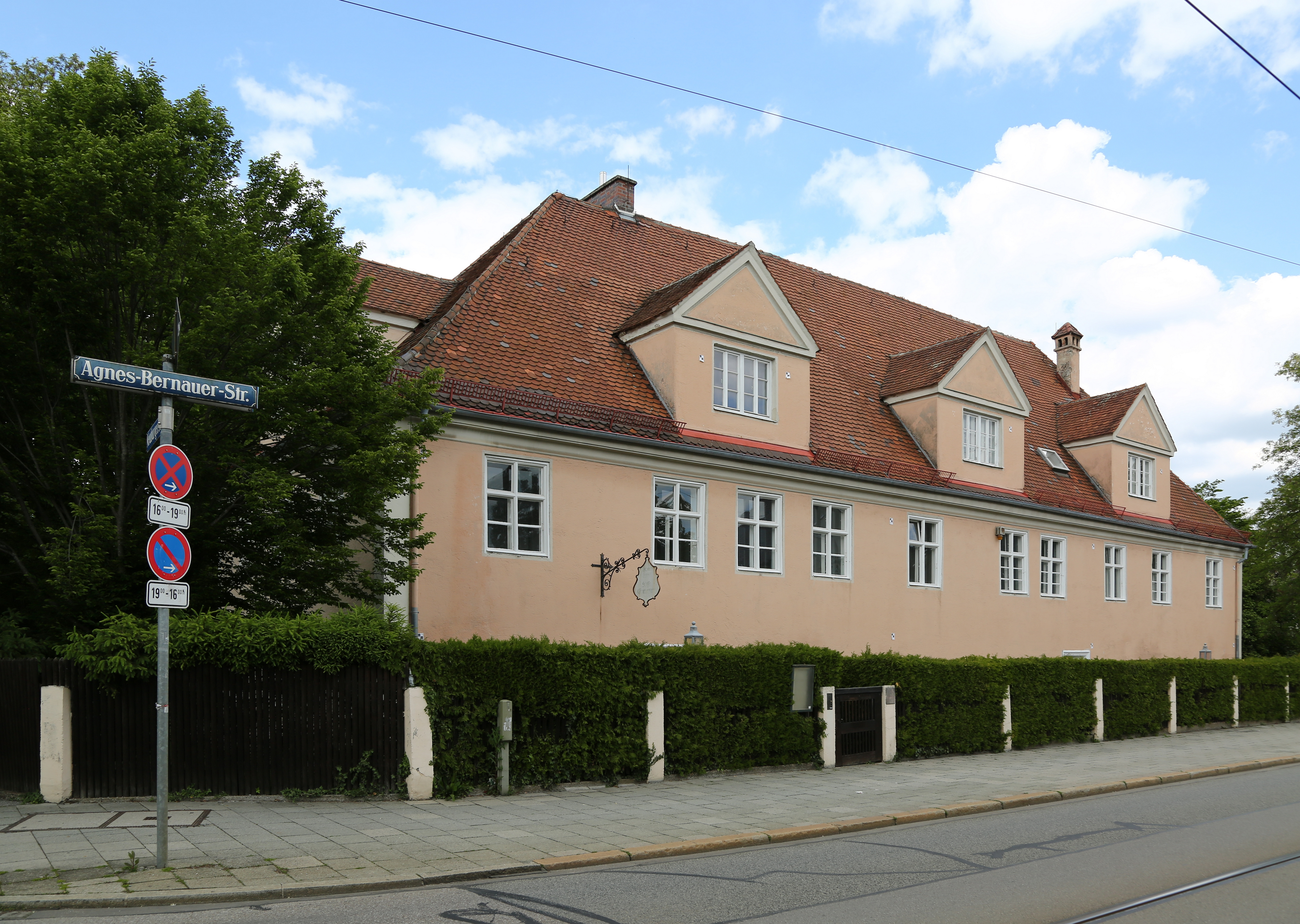 Das Laimer Schlössl ist ein denkmalgeschütztes Gebäude an der Agnes-Bernauer-Straße in München-Laim. Es war Wohnsitz von Agnes Bernauer und im 20. Jahrhundert von Theodor Fischer.